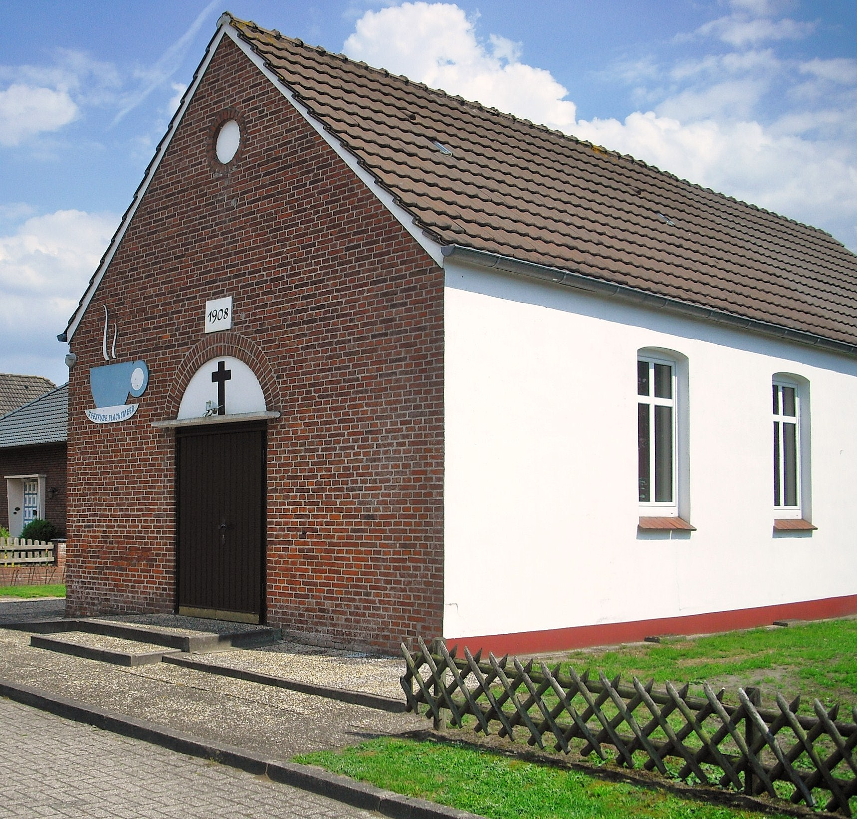 Baptistenkapelle Flachsmeer (erb. 1908)